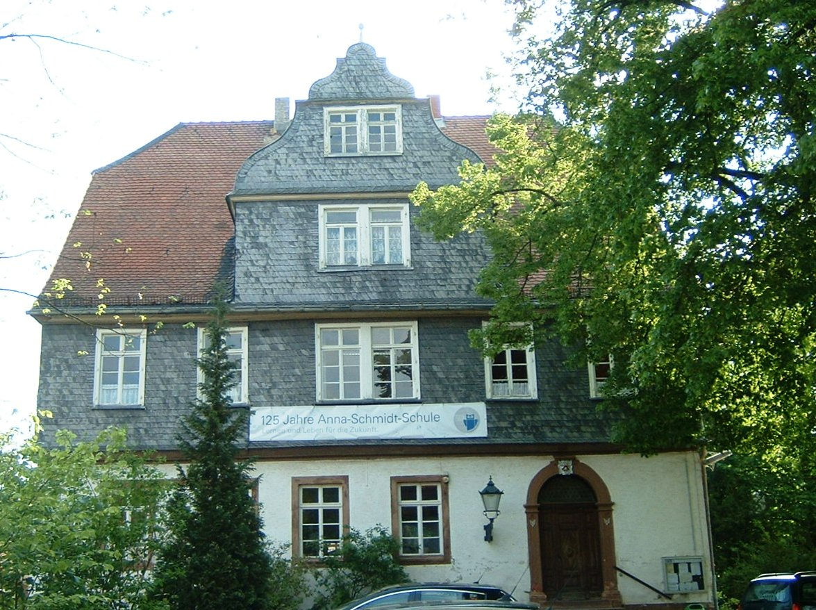 Anna-Schmidt-Schule Verwaltungsgebäude in Frankfurt Nieder- Erlenbach